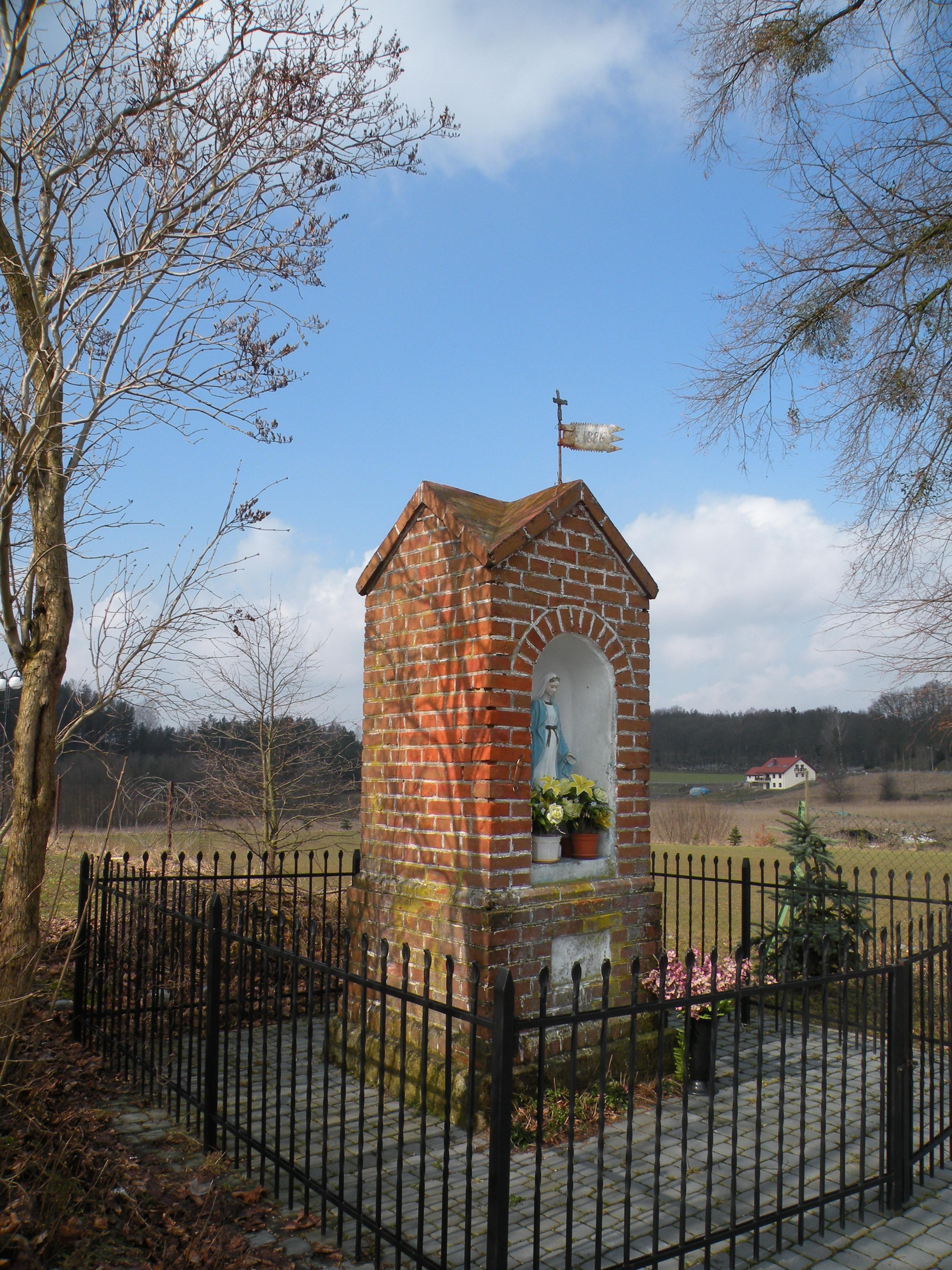 Brąswałd